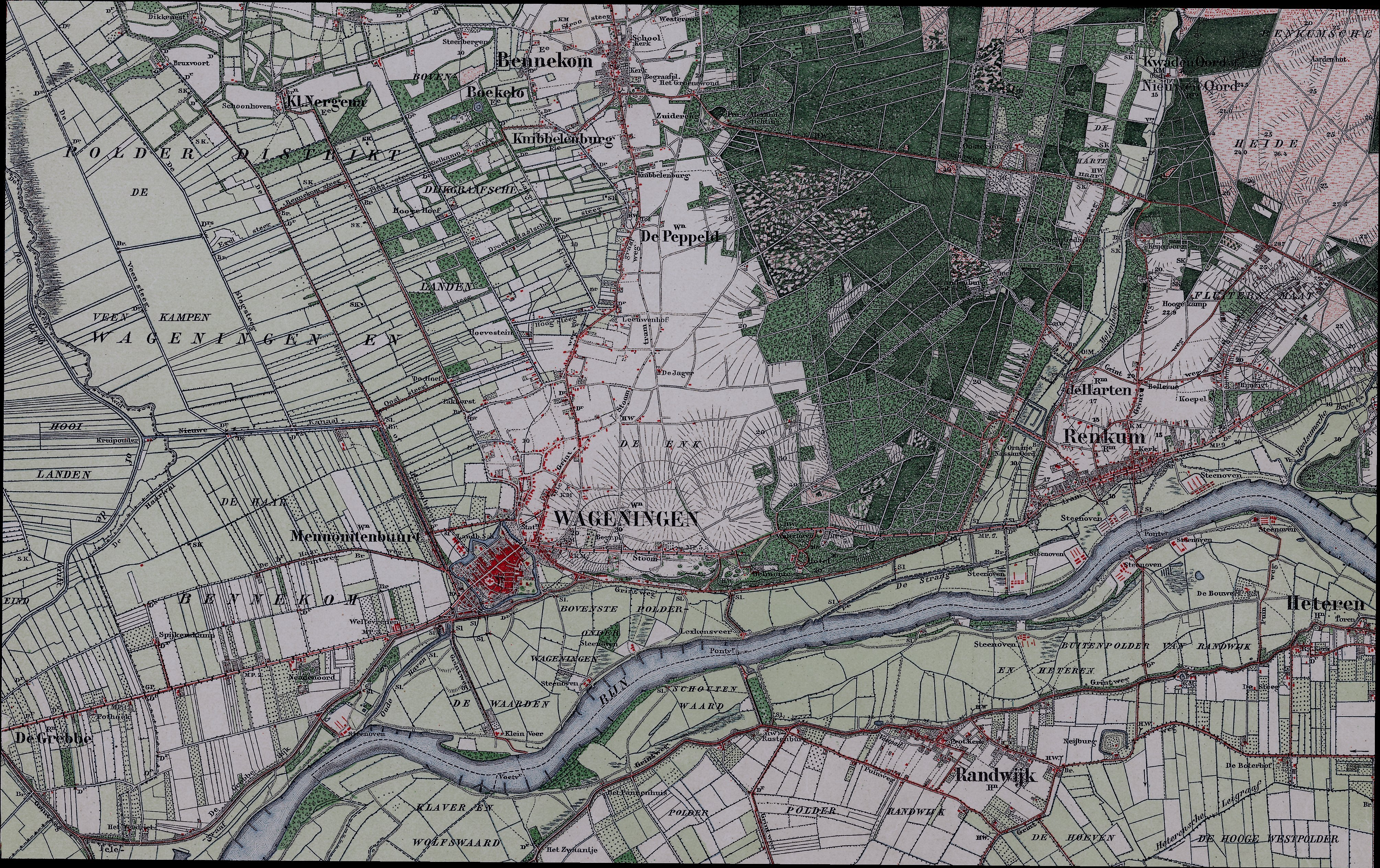 Kaart van de regio Wageningen in 1906; een voorbeeld van het Kadaster